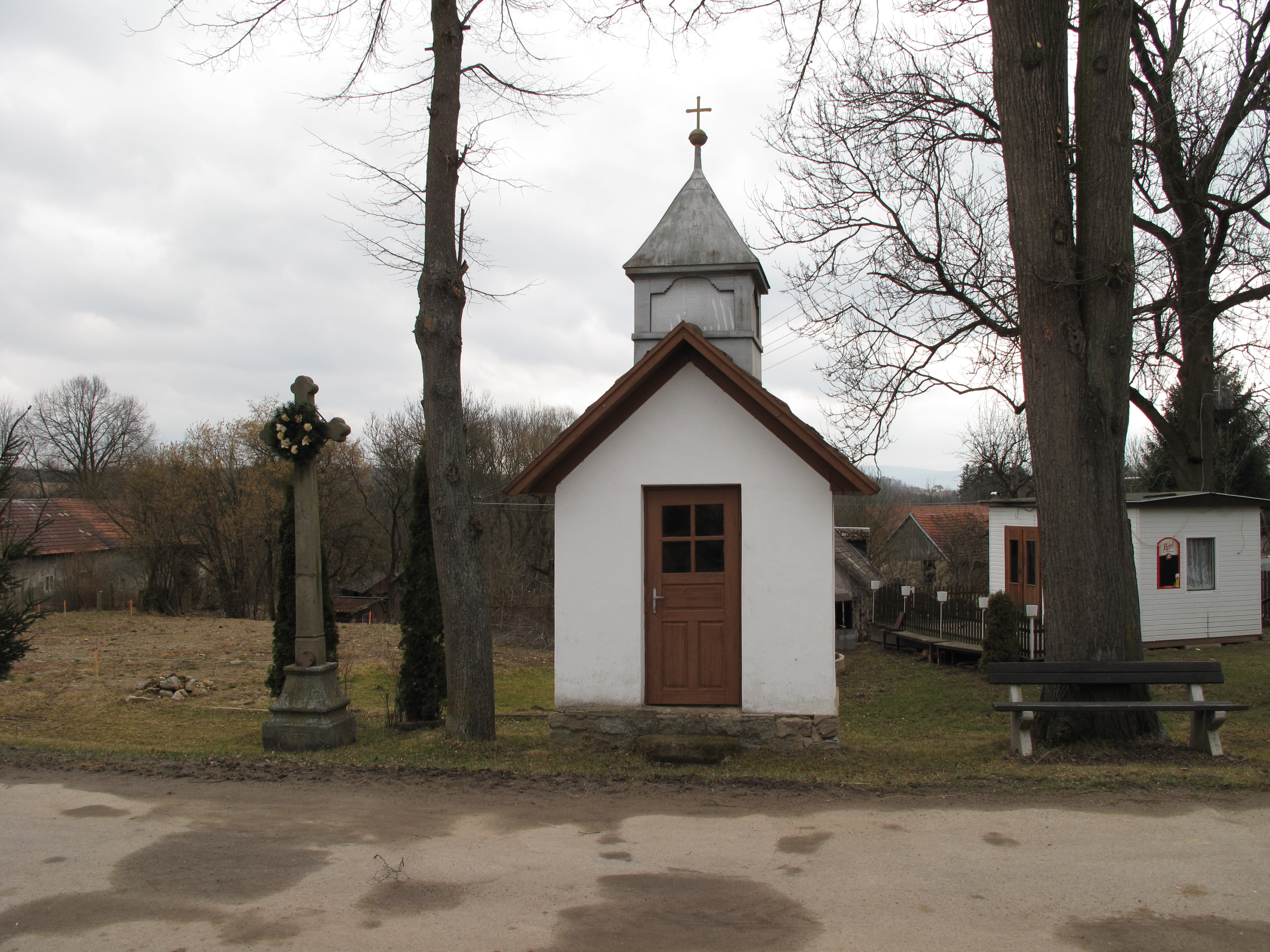 Kaplička v Chotěměřicích. Okres Havlíčkův Brod, Česká republika.